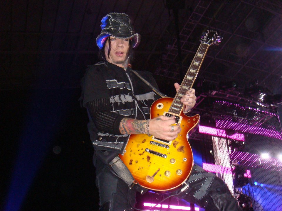 DJ Ashba in Mexico